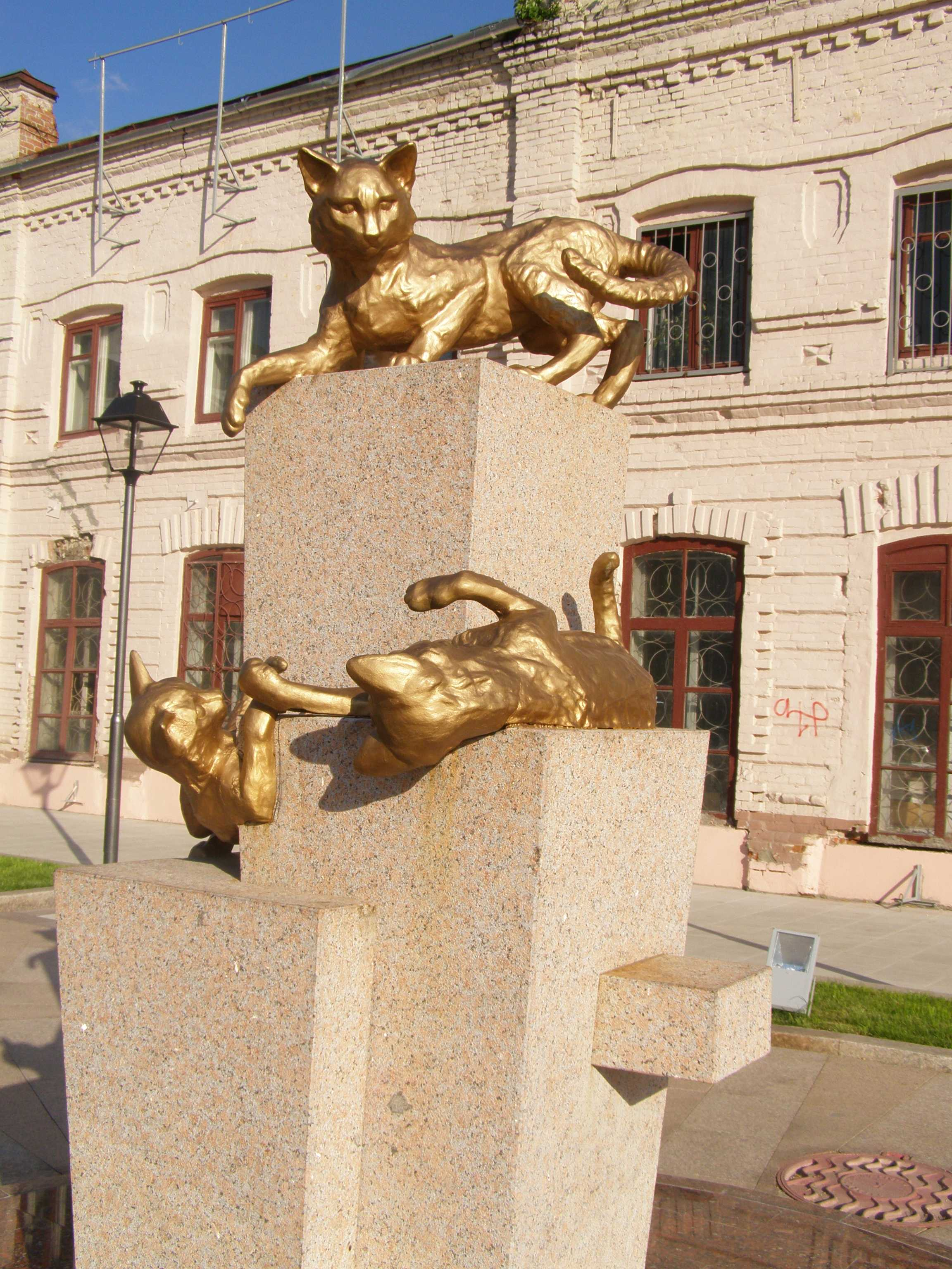 Skvaro de siberiaj katoj. Tjumeno, Rusio.